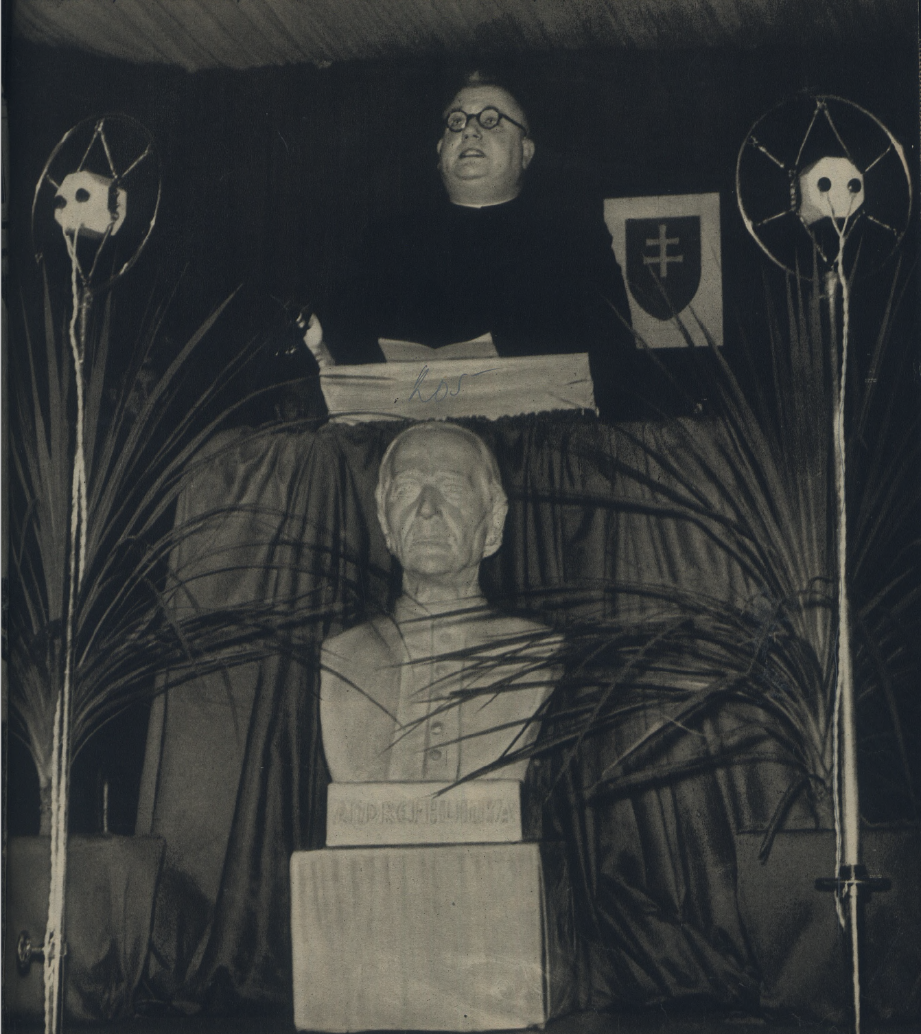 "„Vojnová zimná pomoc znamená hrdinskú obeiavosf na oltár konečného dobra ...", president Republiky Dr. Jozef Tiso 12. oklóbra 1941"